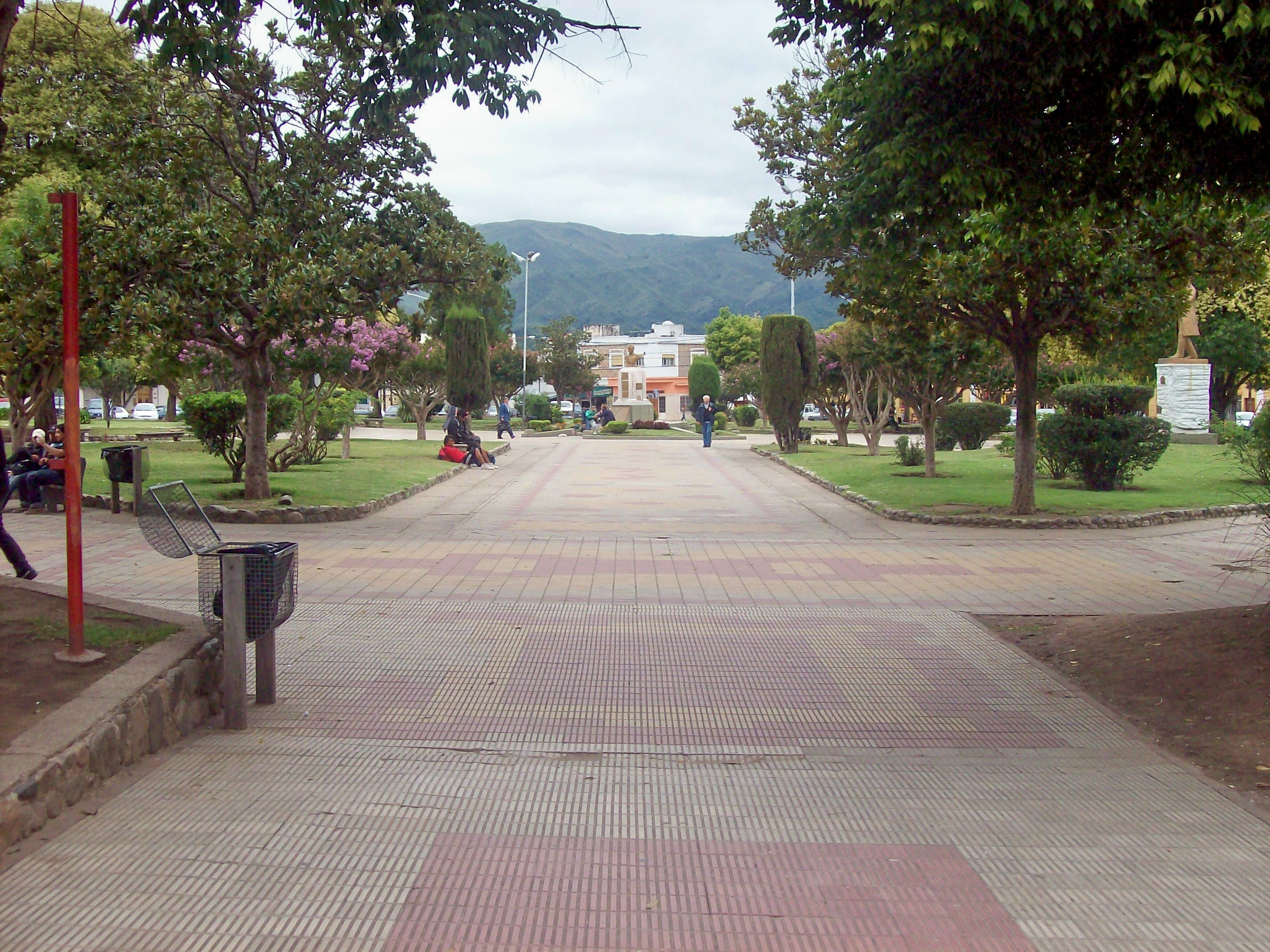 Plaza San Martín, en la ciudad de Cosquín, provincia de Córdoba, Argentina. Tomado desde San Martín y Salta.